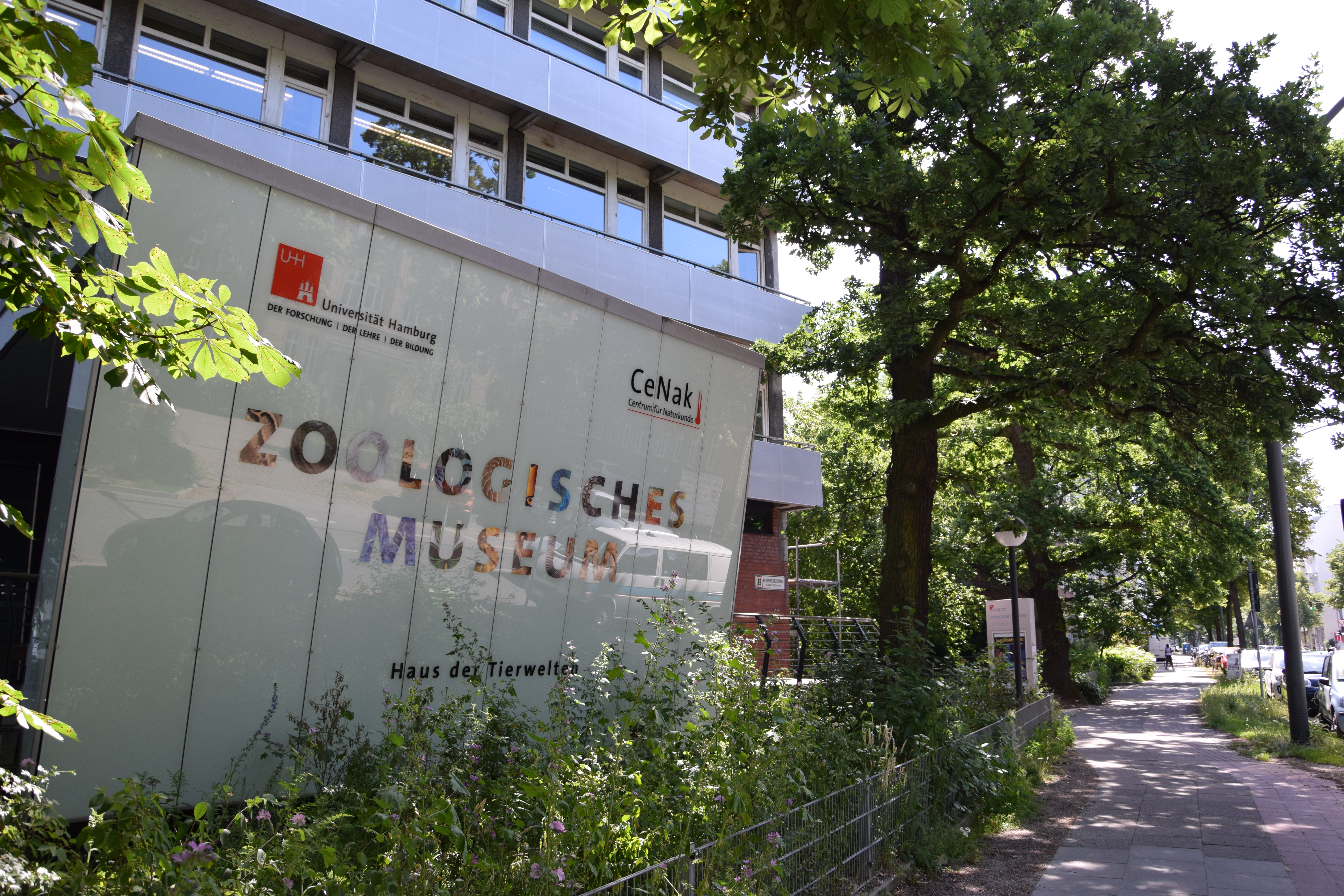 Eingang des Zoologischen Museums Hamburg